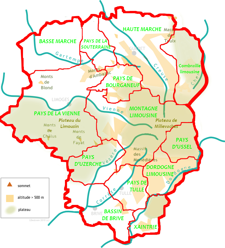 Carte des pays traditionnels du Limousin